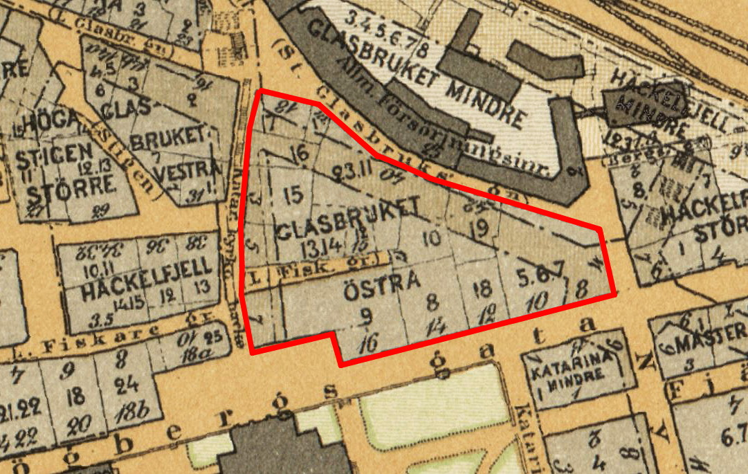 Del av Stockholmskarta visande kvarteret "Glasbruket Östra" (dagens Drottningen) på Södermalm.